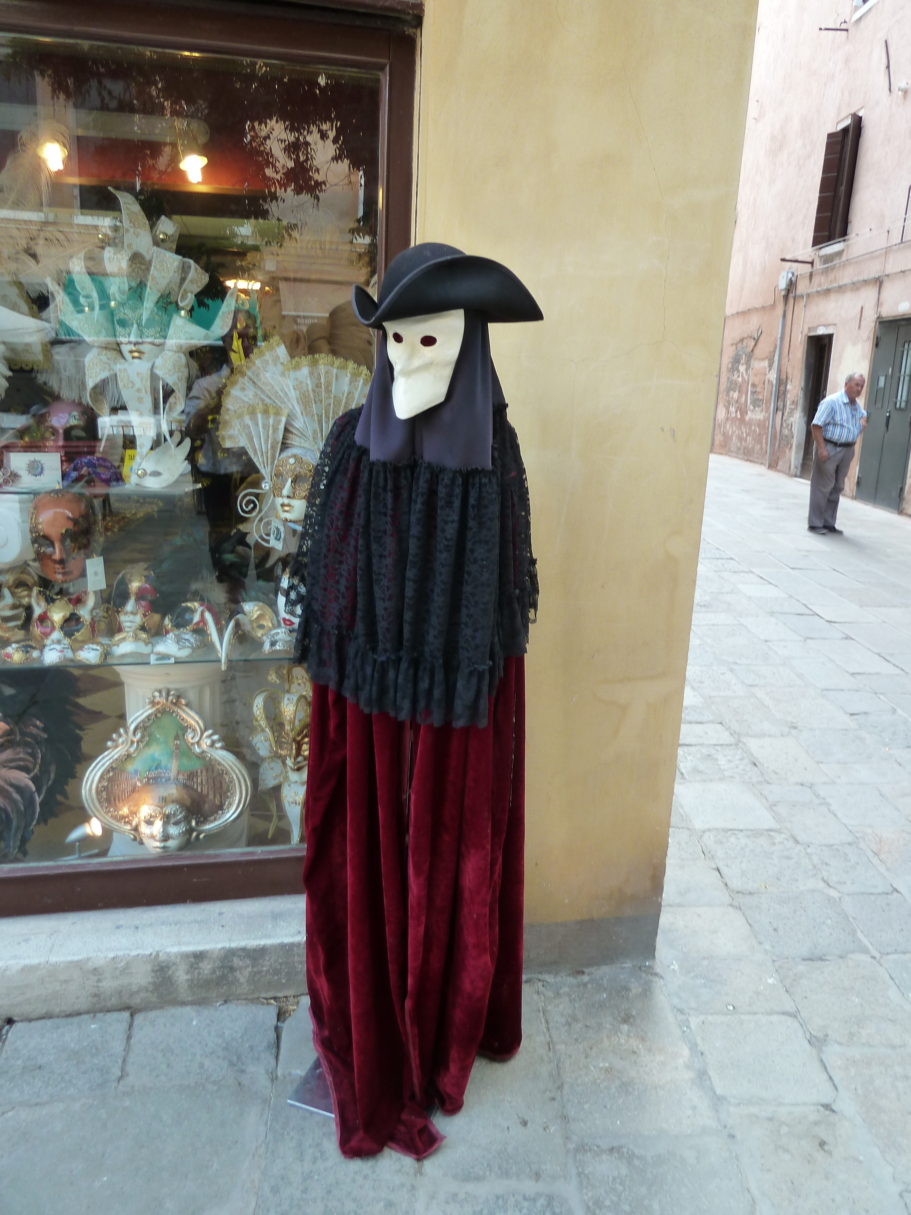 Carnival venice masks